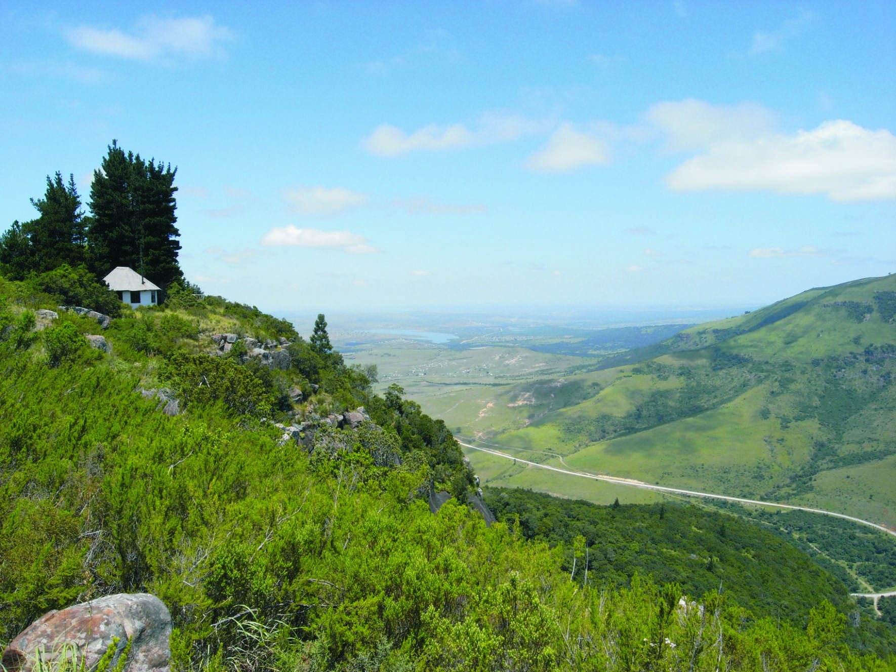 Blick ins Tyhume-Valley